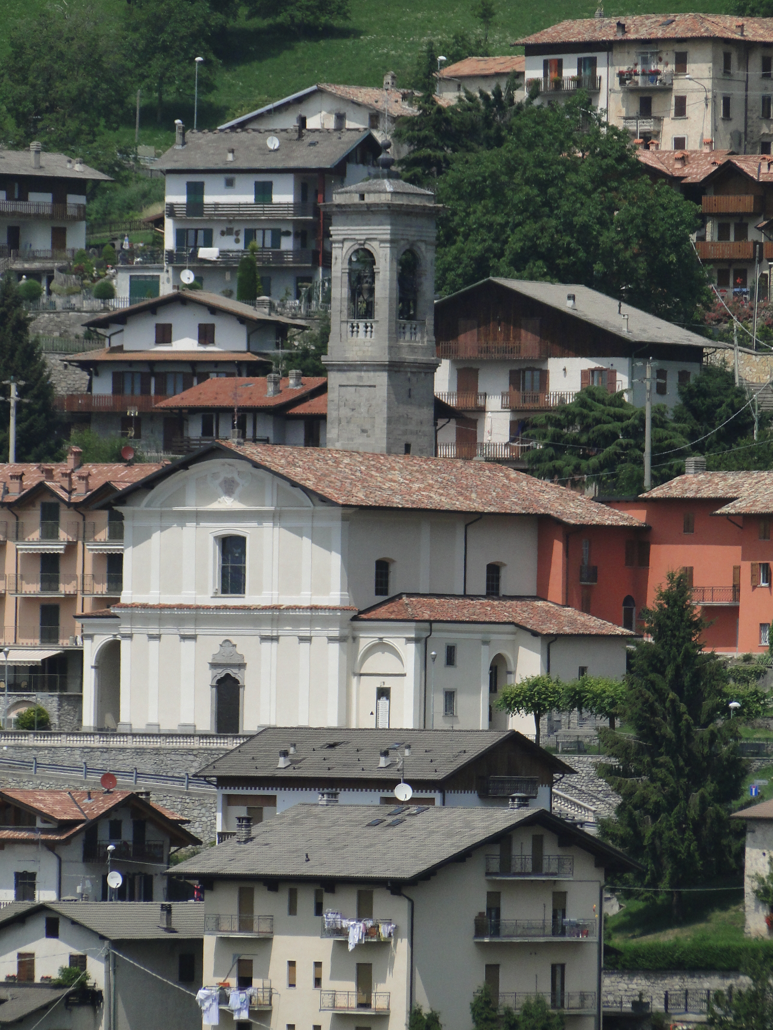 Aviatico (BG), vista della chiesa parrocchiale di San Giovanni Battista